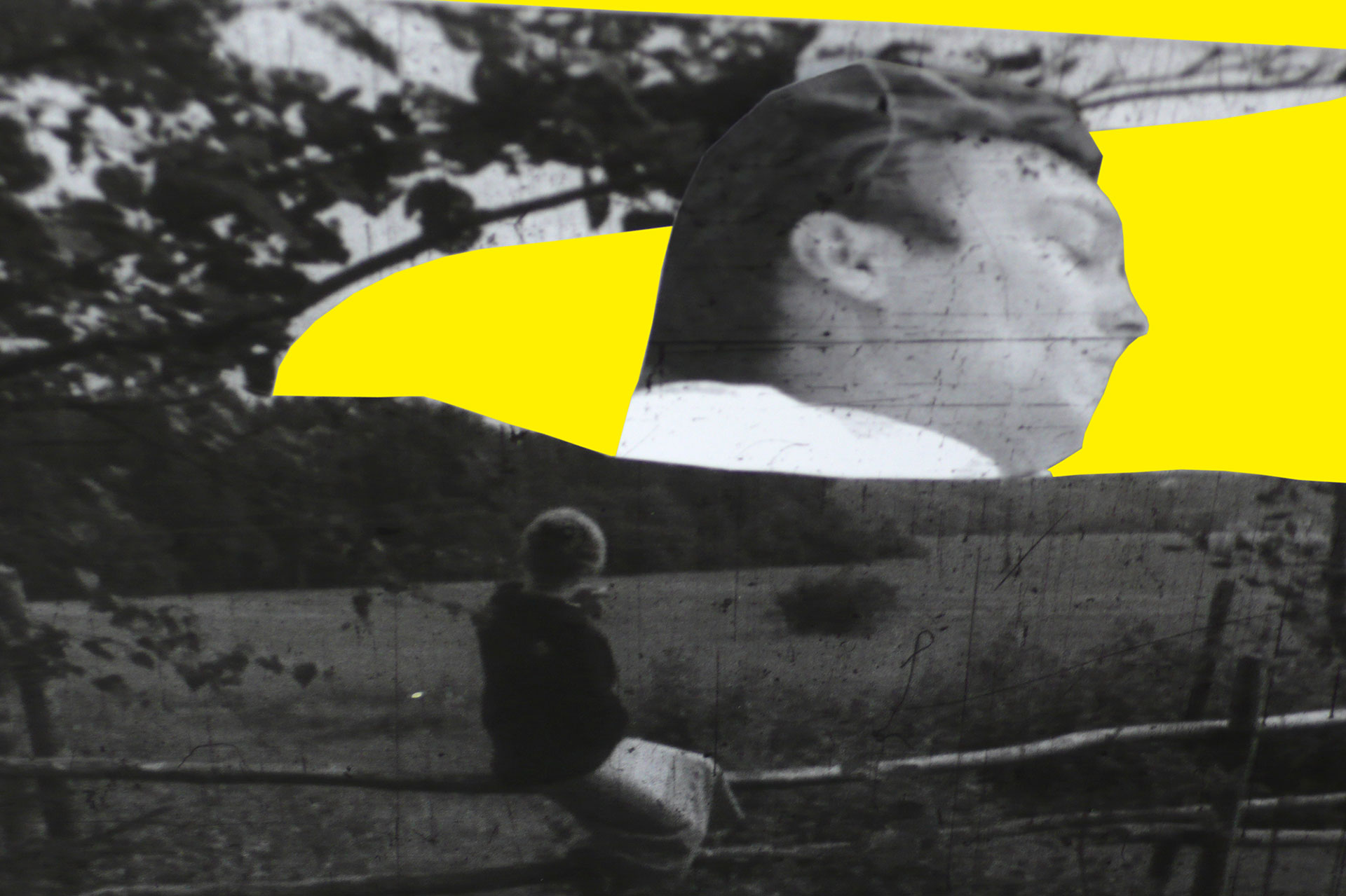 «Mirror by Mirror» («Зеркало к Зеркалу», 2008)